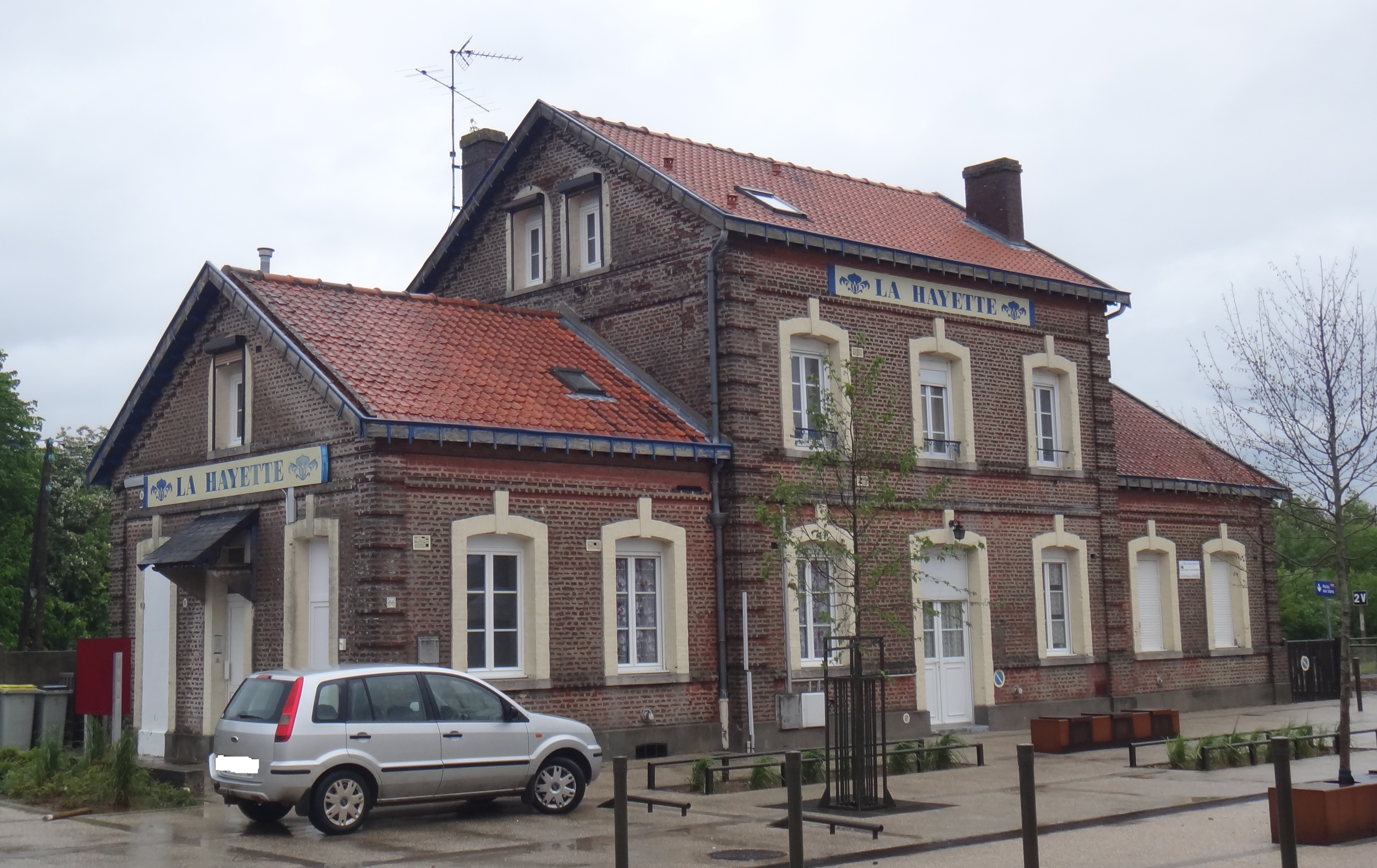 Gare de Feuquières - Fressenneville, Somme, Picardie, France, en mai 2014.